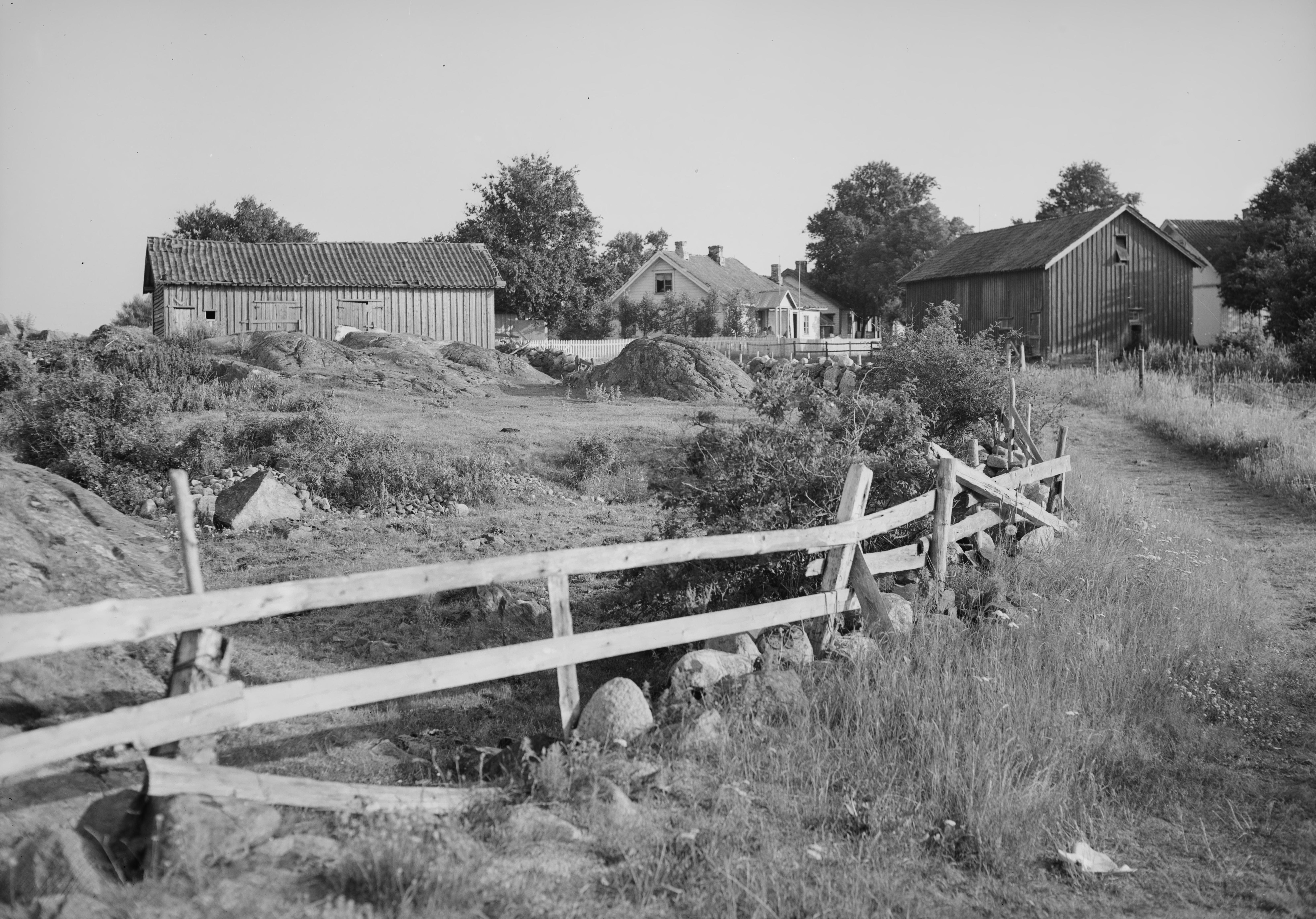 Bildet er hentet fra Nasjonalbibliotekets bildesamling. Anmerkninger til bildet var: fotograf :ukjent Stråholmen, Kragerø, Telemark